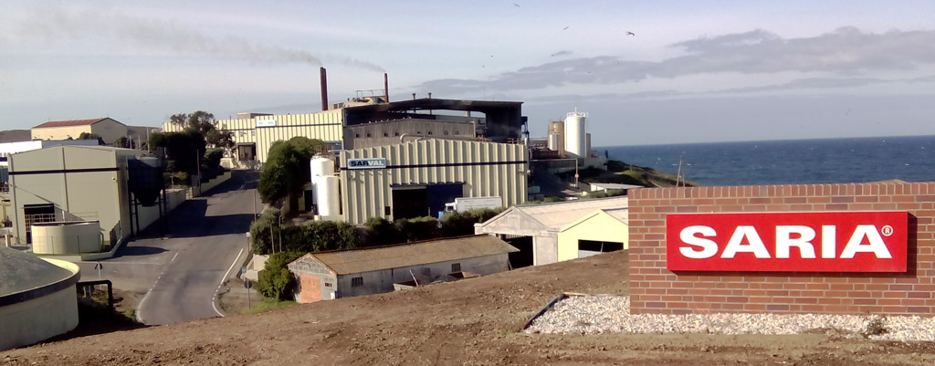 Fábrica de Saria en Suevos, Arteixo.